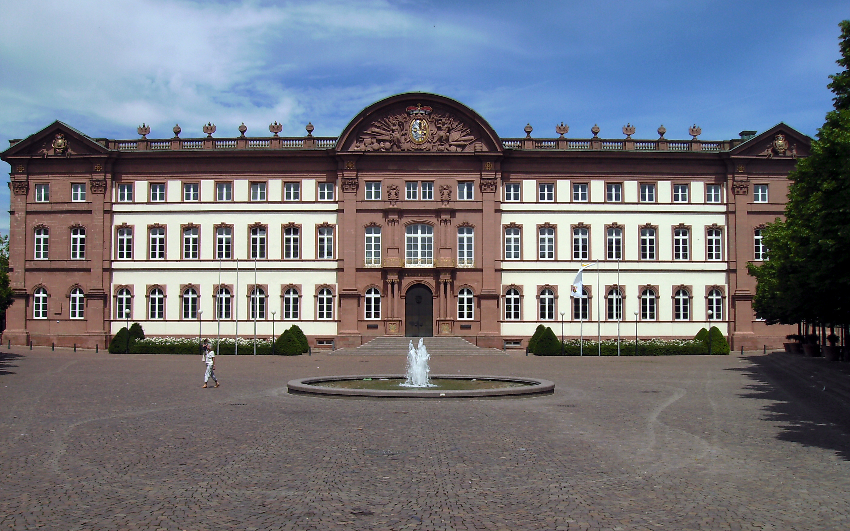 Frontalansicht Herzogschloss Zweibrücken (18. Jahrhundert)